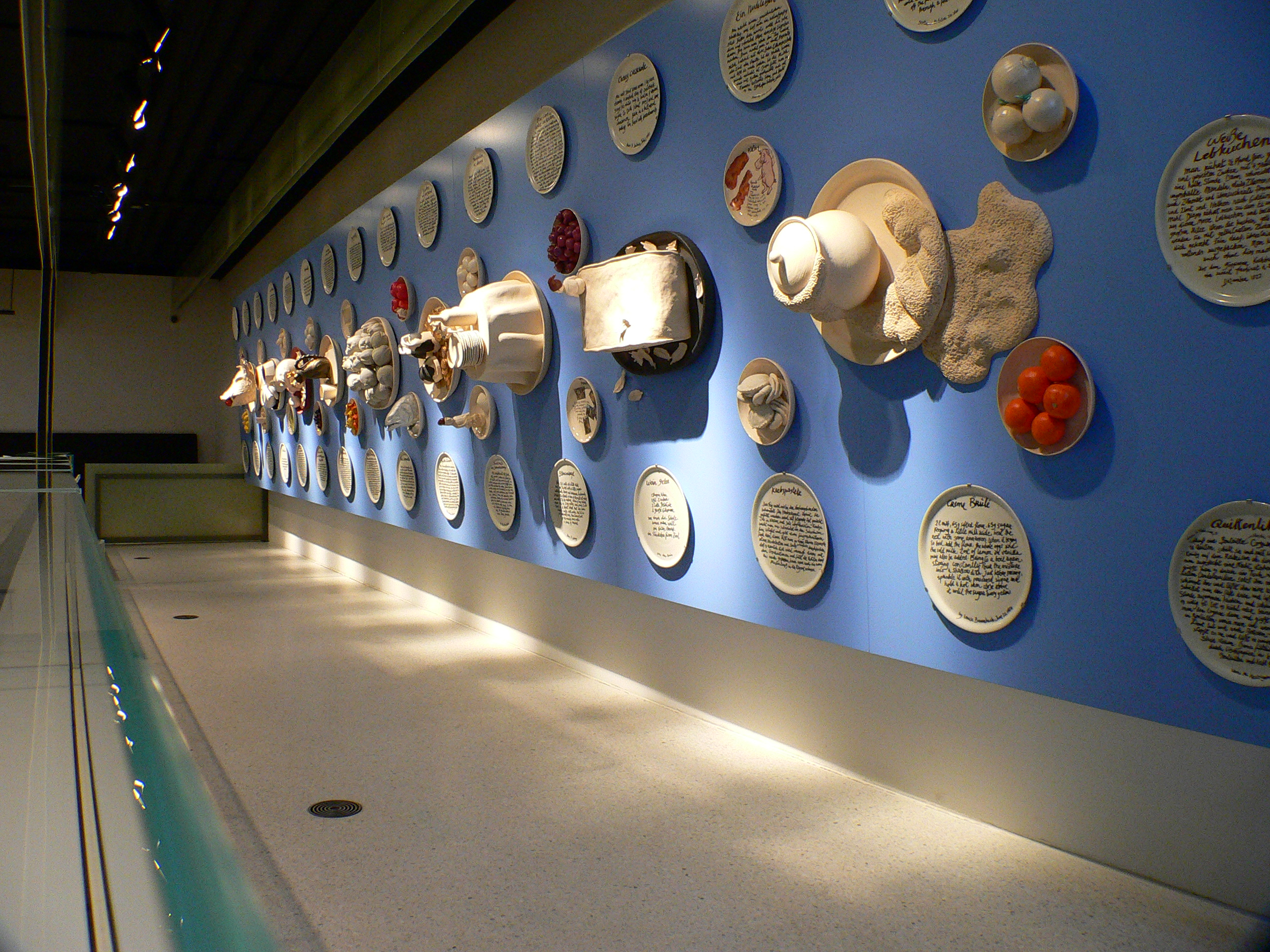 Ausstellungsbeispiel im Museum GrimmWelt in Kassel, Deutschland